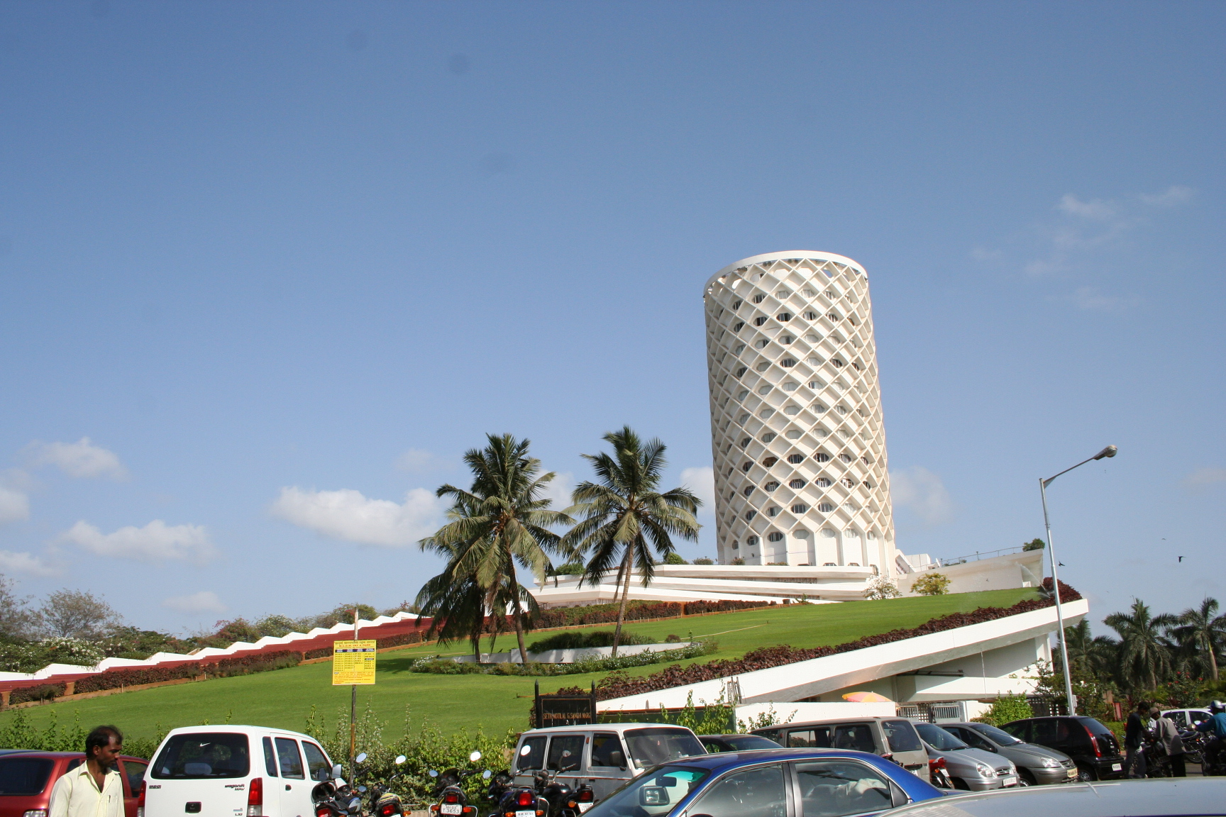 Nehru Planetarium at Worli.